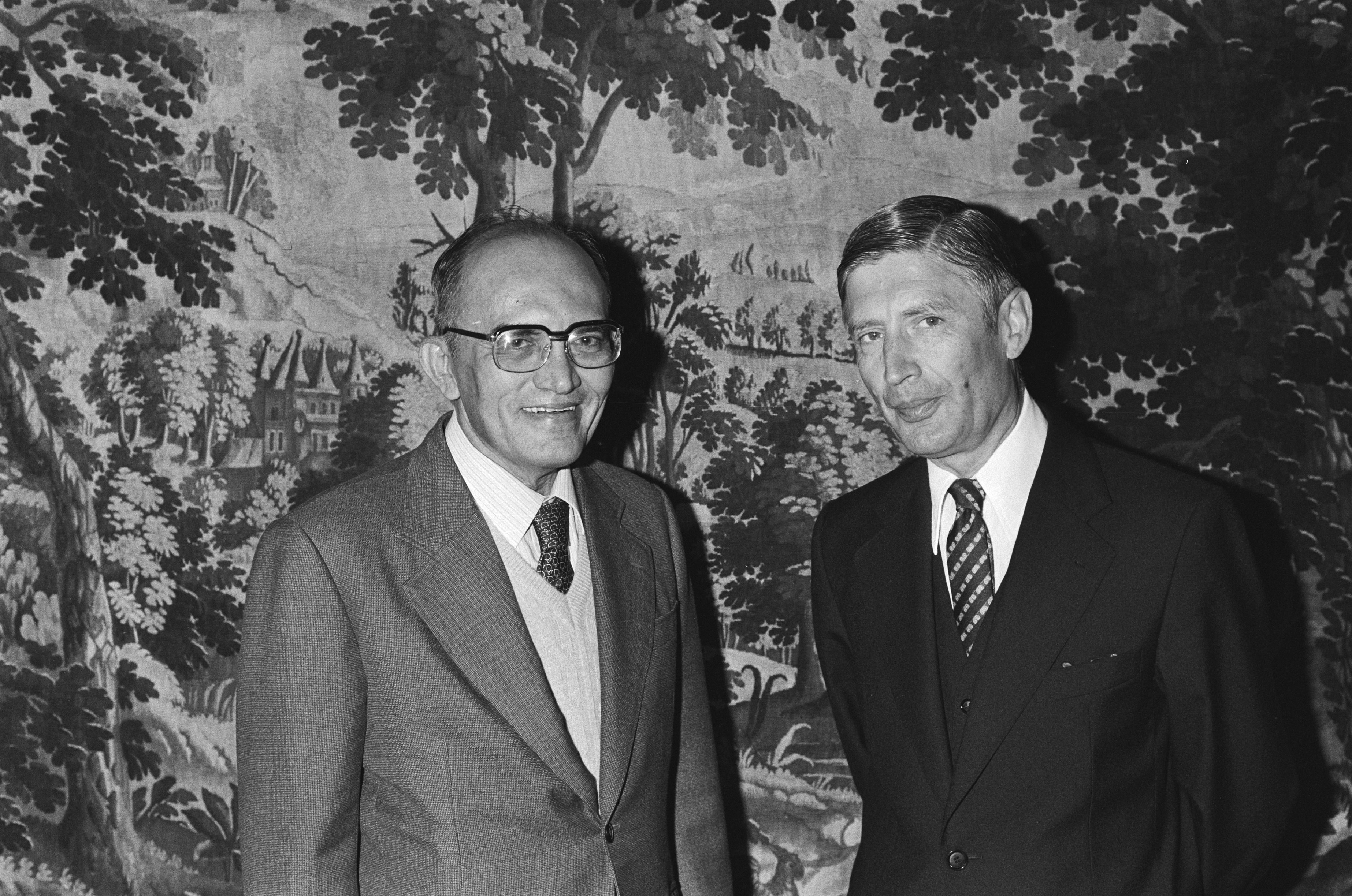 Collectie / Archief : Fotocollectie Anefo Reportage / Serie : Premier Van Agt ontving in het Catshuis Minister van Buitenlandse Zaken van Thailand, Siddhi Savetsila Beschrijving : Van Agt met luchtmaarschalk Siddhi Savetsila Datum : 24 september 1980 Locatie : Den Haag, Zuid-Holland Trefwoorden : ministers, ministers-presidenten Persoonsnaam : Agt, Dries van, Siddhi Savetsila Fotograaf : Dijk, Hans van / Anefo Auteursrechthebbende : Nationaal Archief Materiaalsoort : Negatief (zwart/wit) Nummer archiefinventaris : bekijk toegang 2.24.01.05 Bestanddeelnummer : 931-0371